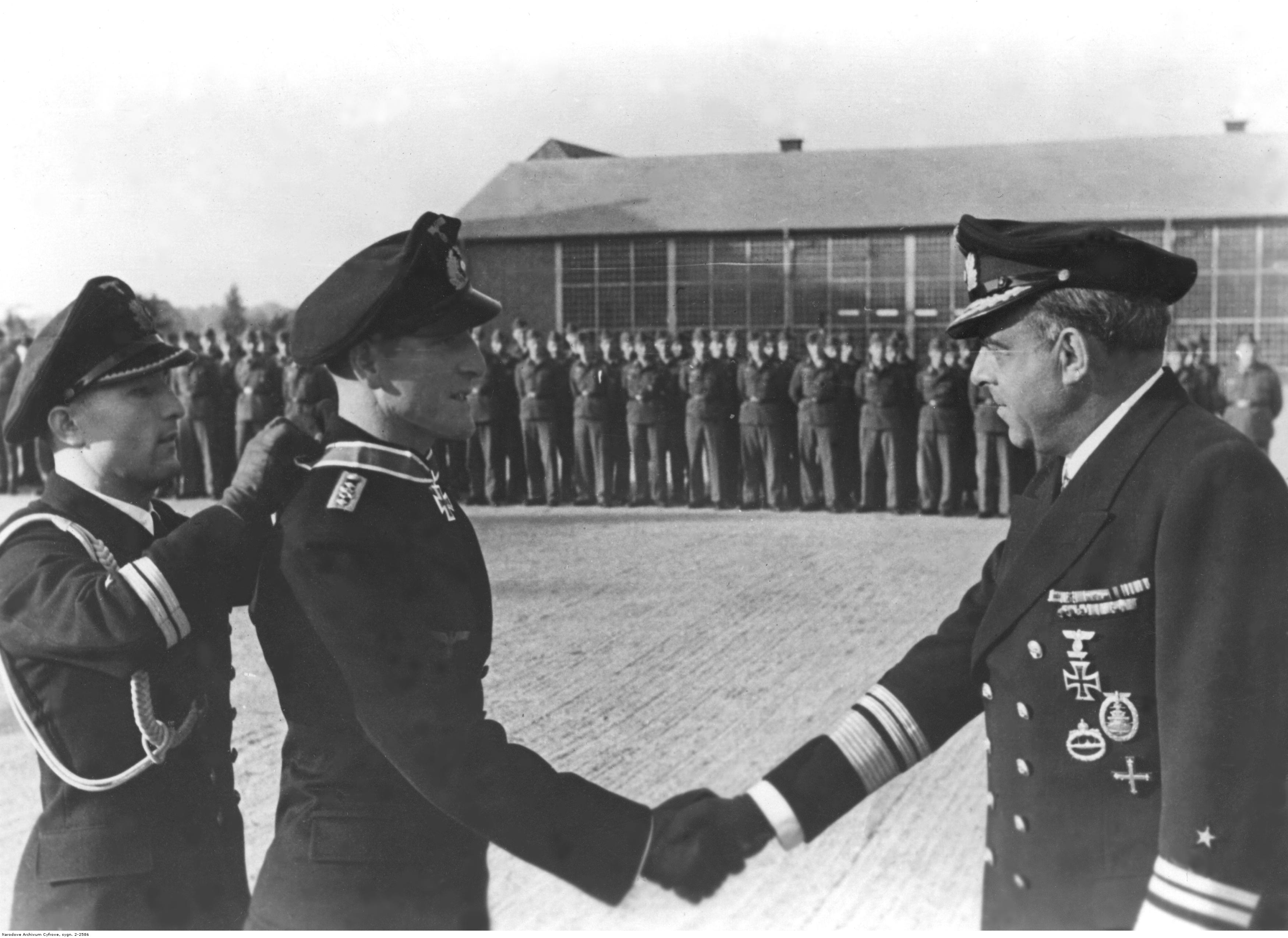 Herbert Berrer pilot jednoosobowej łodzi torpedowej otrzymuje z rąk admirała Helmuta Heye nadany mu przez Fuhrera Krzyż Rycerski.